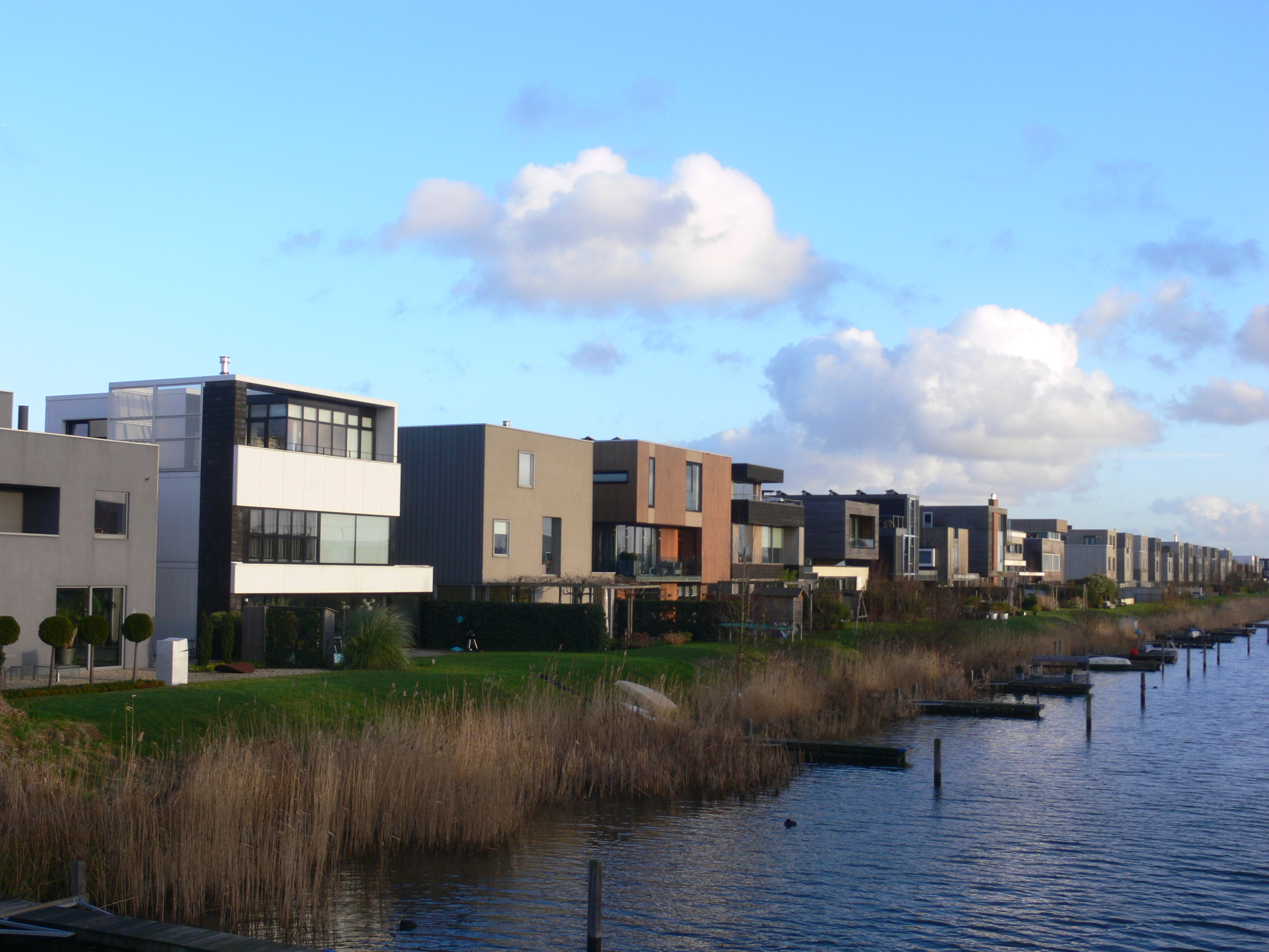 Paysage et maisons contemporaines du quartier d'IJburg, à Amsterdam